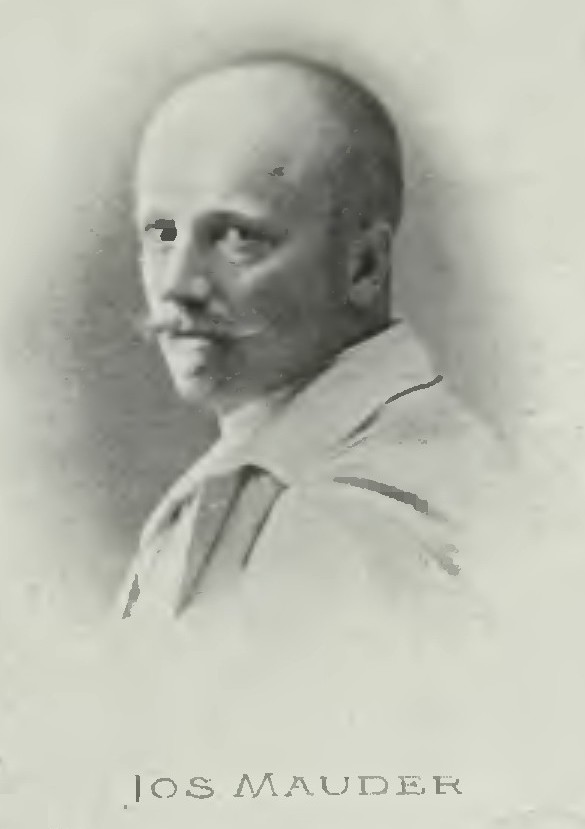 Portrét – Josef Mauder (1854-1920), Český sochař a malíř.